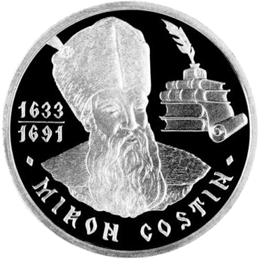 Реверс памятной монеты "370 лет со дня рождения Мирона Костина"